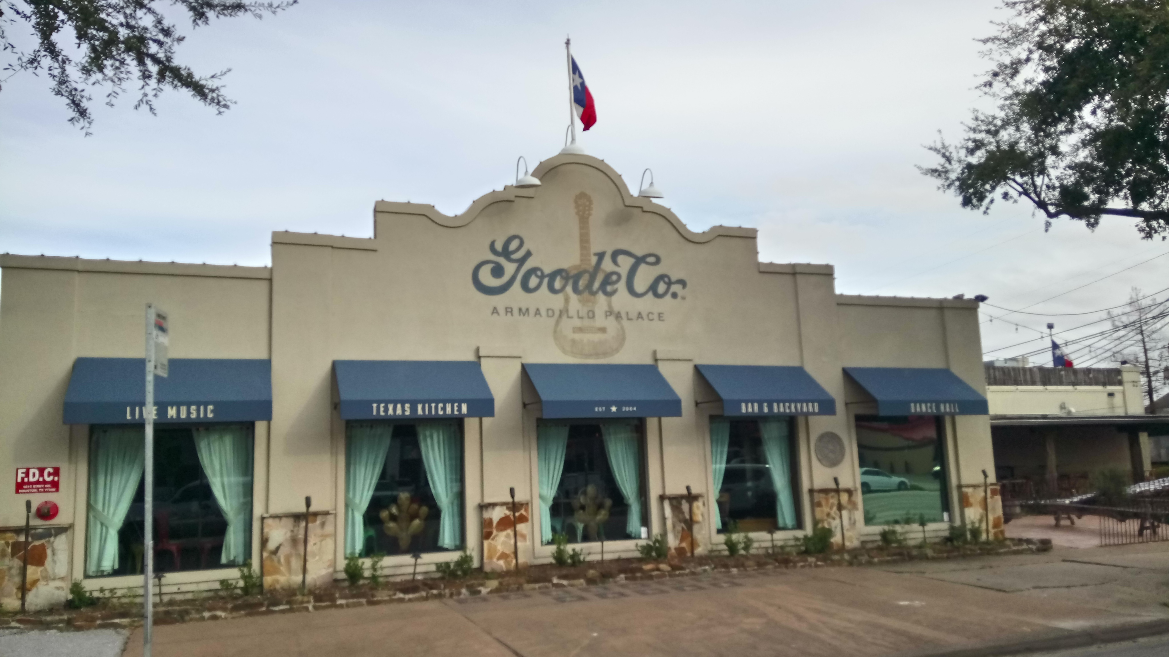 Armadillo Palace